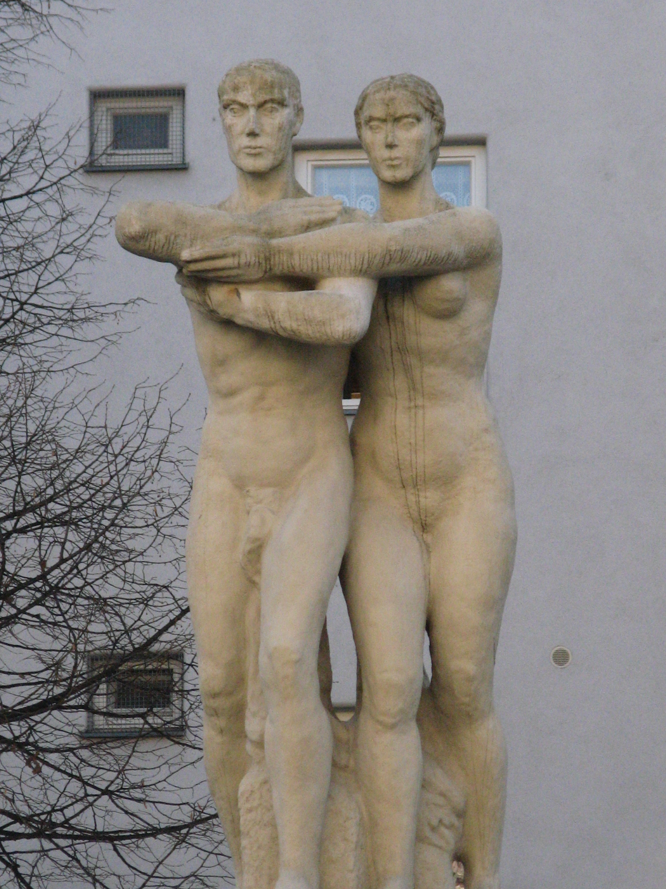 Figurale Gruppe (1931) von Otto Fenzl, Anton-Hölzl-Hof, Laxenburger Straße 94, Wien-Favoriten